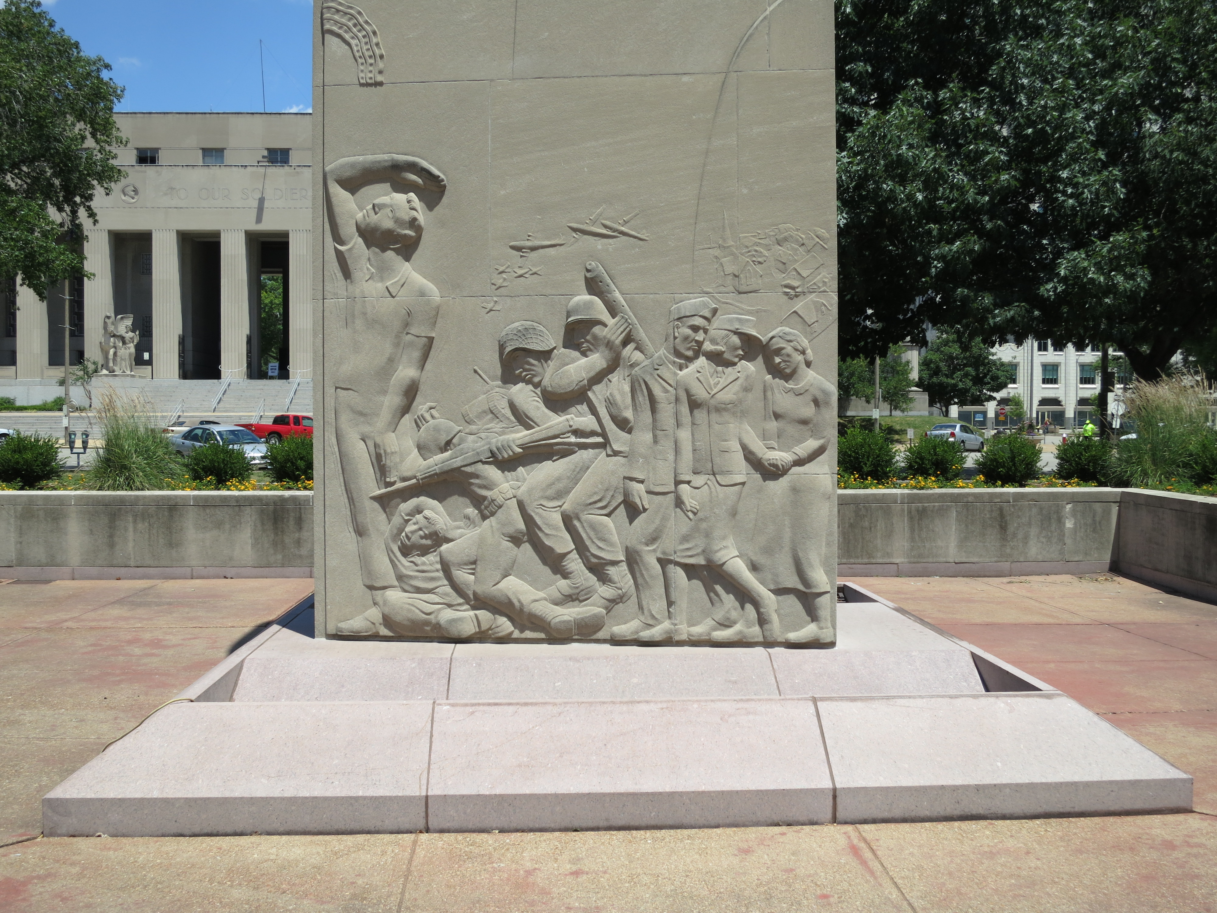 Veterans Memorial